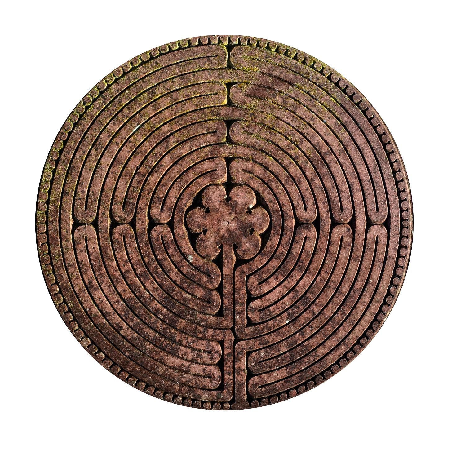 Labyrinth der Kathedrale von Notre-Dame de Chartres in Stein